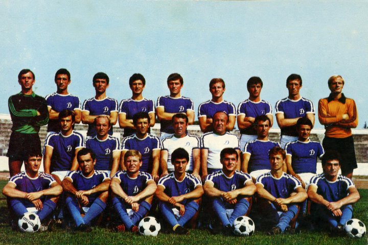 Dinamo e Tiranes